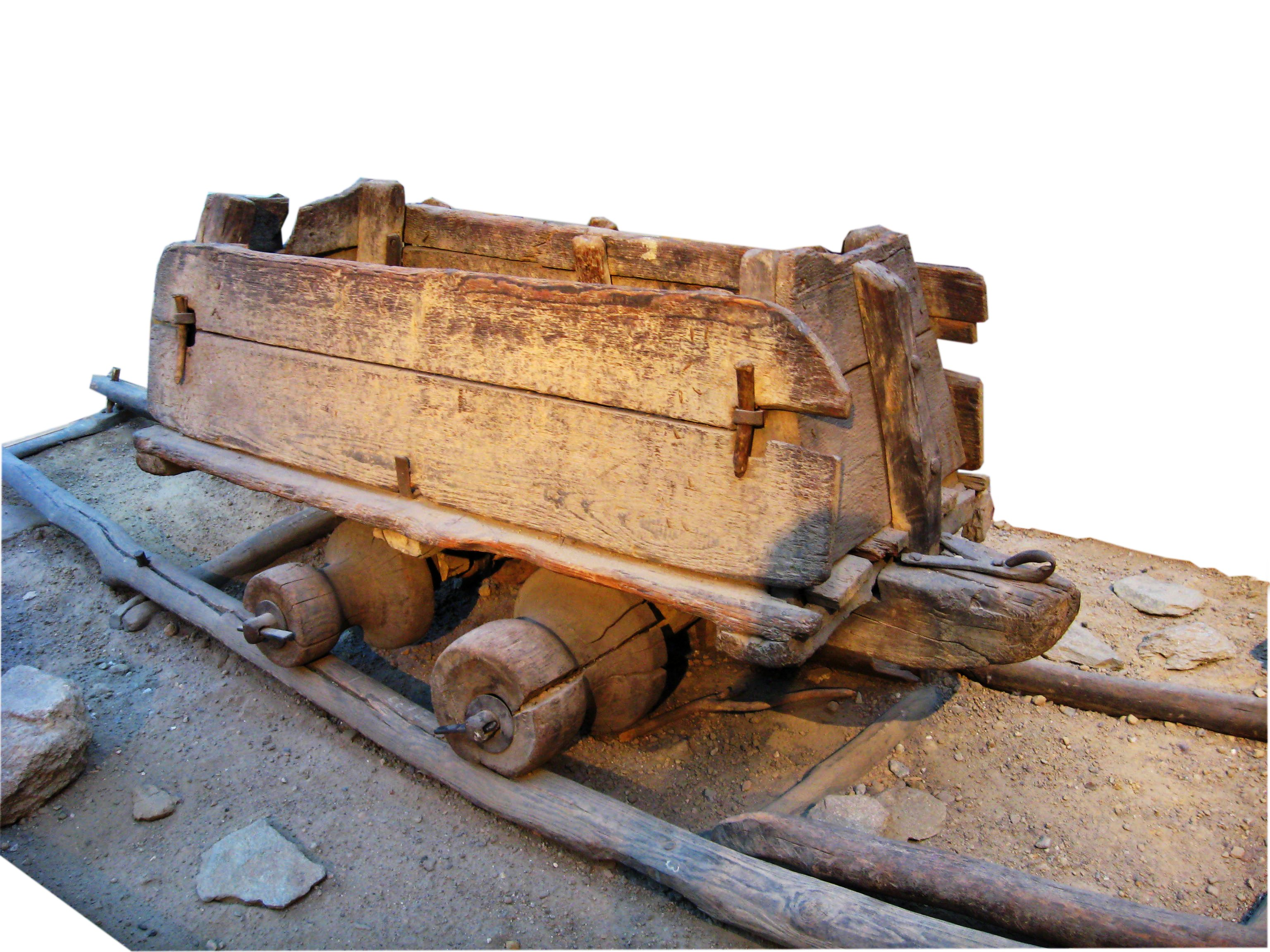 Vagonet de lemn din secolul al XVI-lea. Vagonetul şi şinele provin din fosta mină de aur “Sf.Apostoli” de lȃngă Brad.